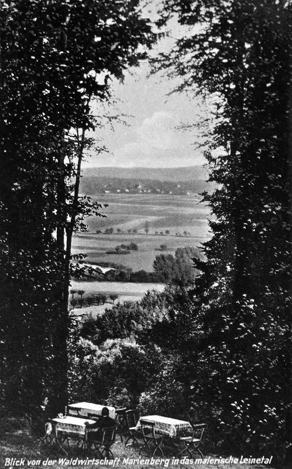 Blick in das Leinetal im Jahr 1932 von der Waldgaststätte Marienberg bei Schloss Marienburg, Region Hannover, Niedersachsen, Deutschland.